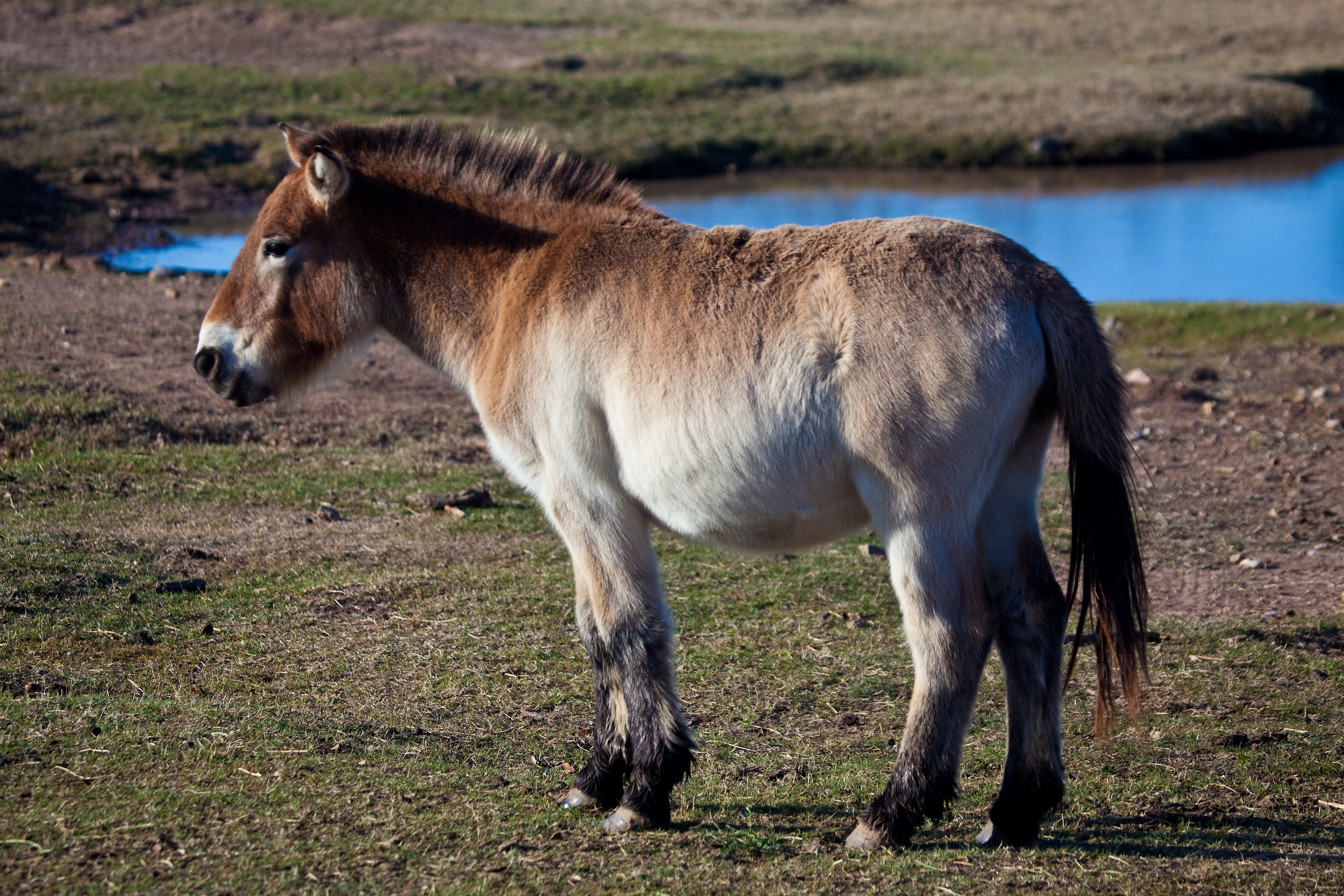 Przewalski horse